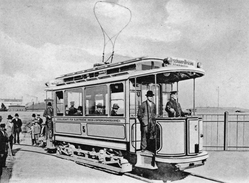 Wagen 5 der Flachbahn der Gesellschaft für elektrische Hoch- und Untergrundbahnen in Berlin.